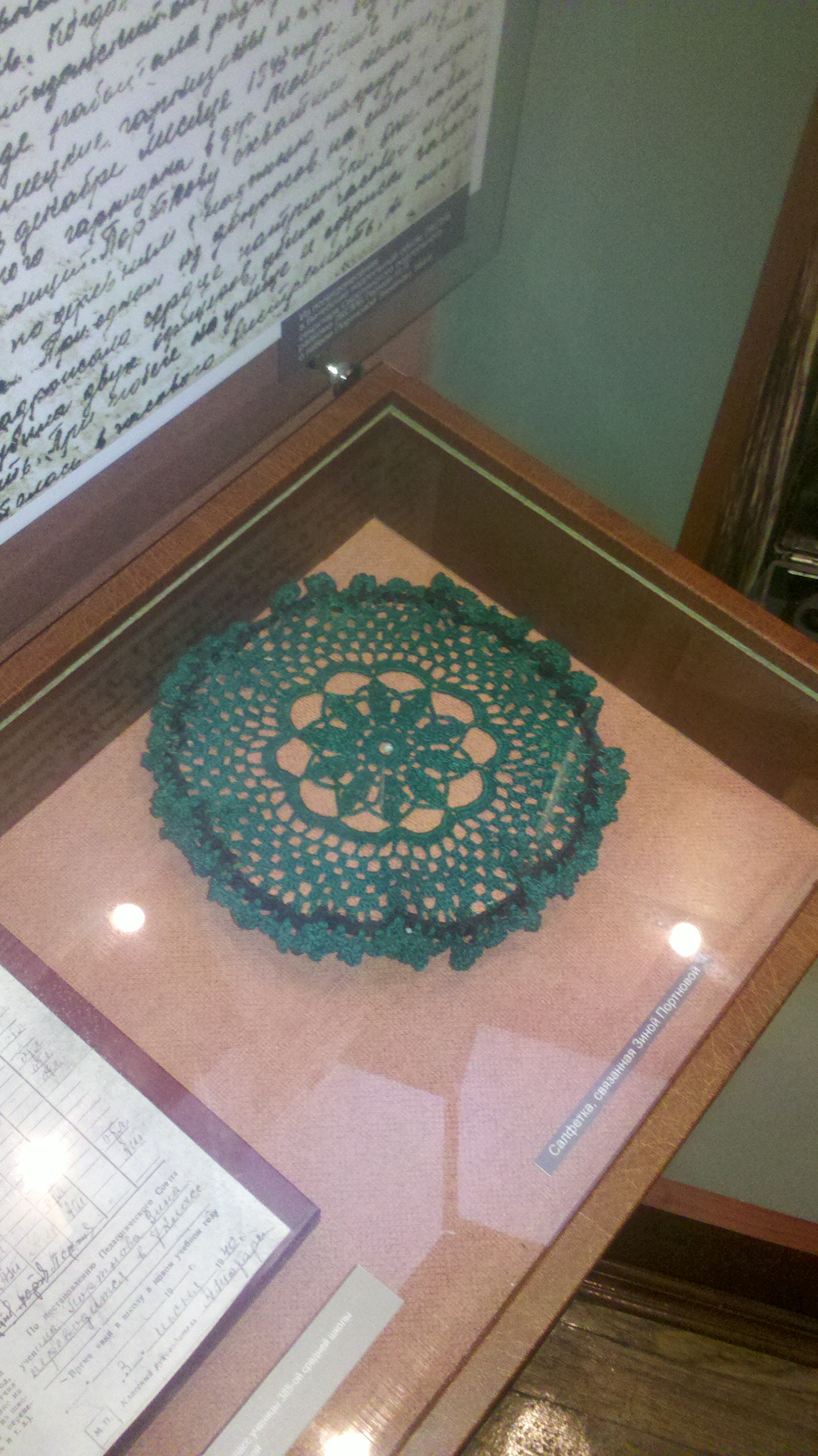 Обаль, Музей - Салфетка, связанная Зиной Портновой